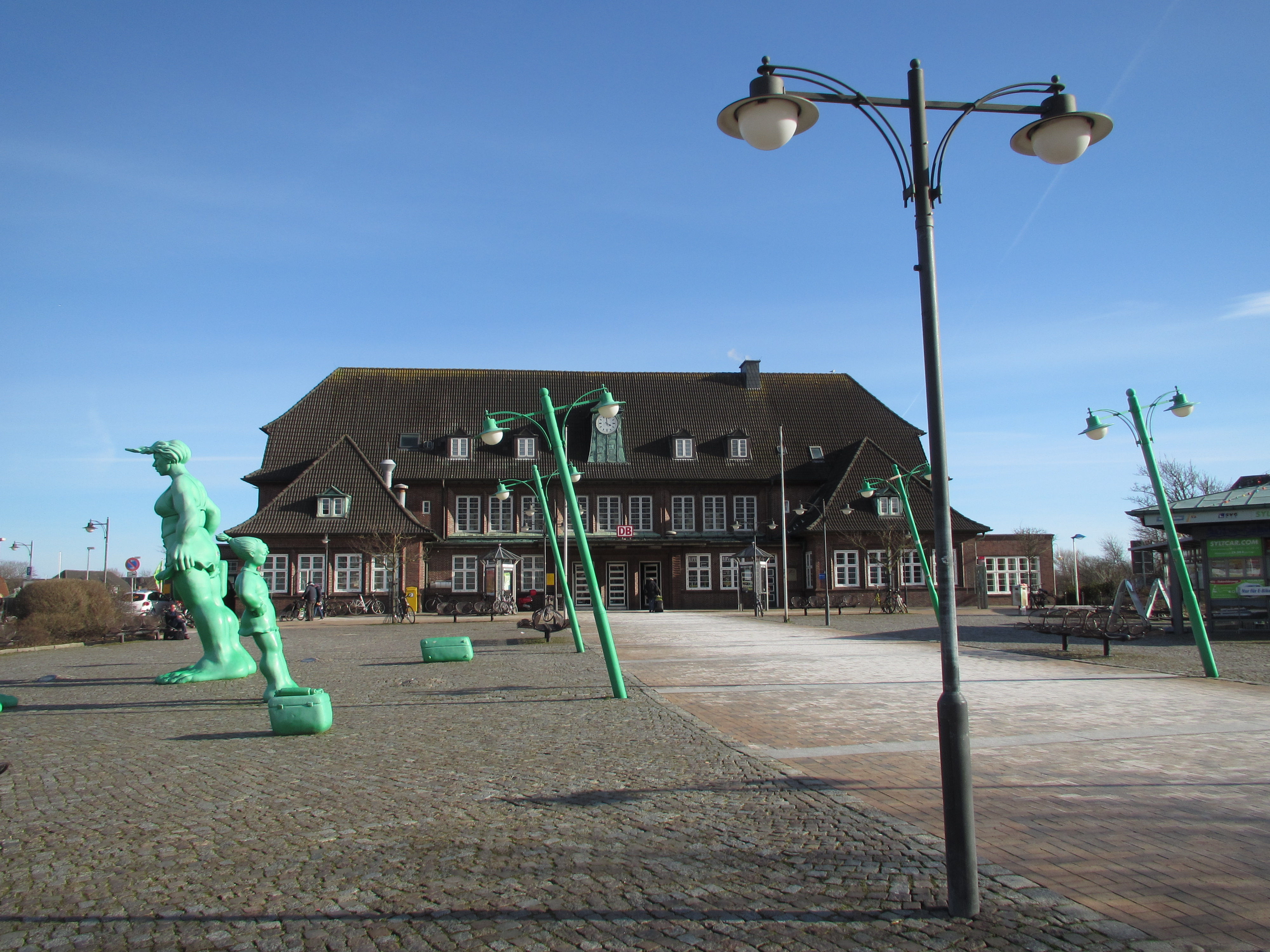 Sylt-Westerland-Bahnhof mit Skulptur Reisende im Wind von Bildhauer Martin Wolke